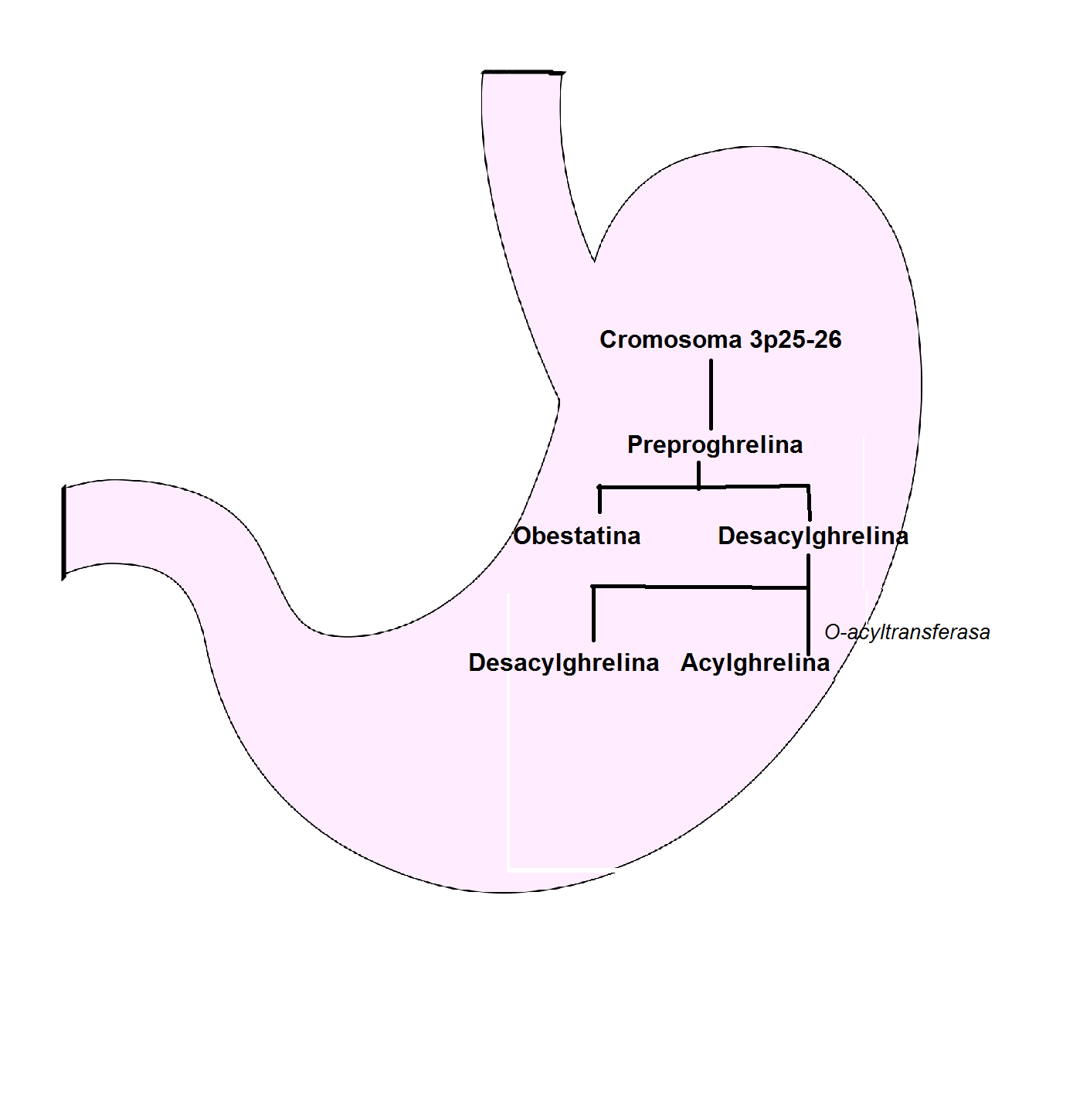 Passos de formacio de la ghrelina